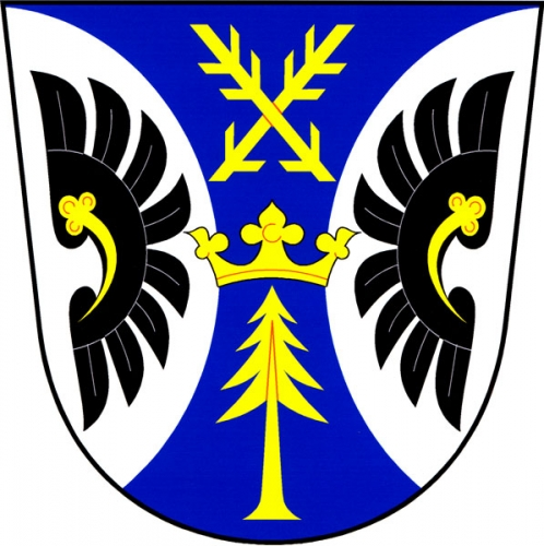 znak, Radňovice, okres Žďár nad Sázavou